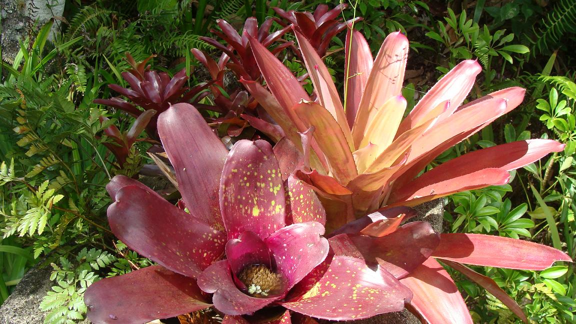 Muchas especies de bromelias utilizan sus hojas para formar una especie de cáliz que recoge el agua de lluvia, ya que casi siempre carecen de raíces que puedan tomar el agua del suelo. Foto tomada en los Jardines Ecológicos Topotepuy en Baruta, Estado MIranda, Venezuela